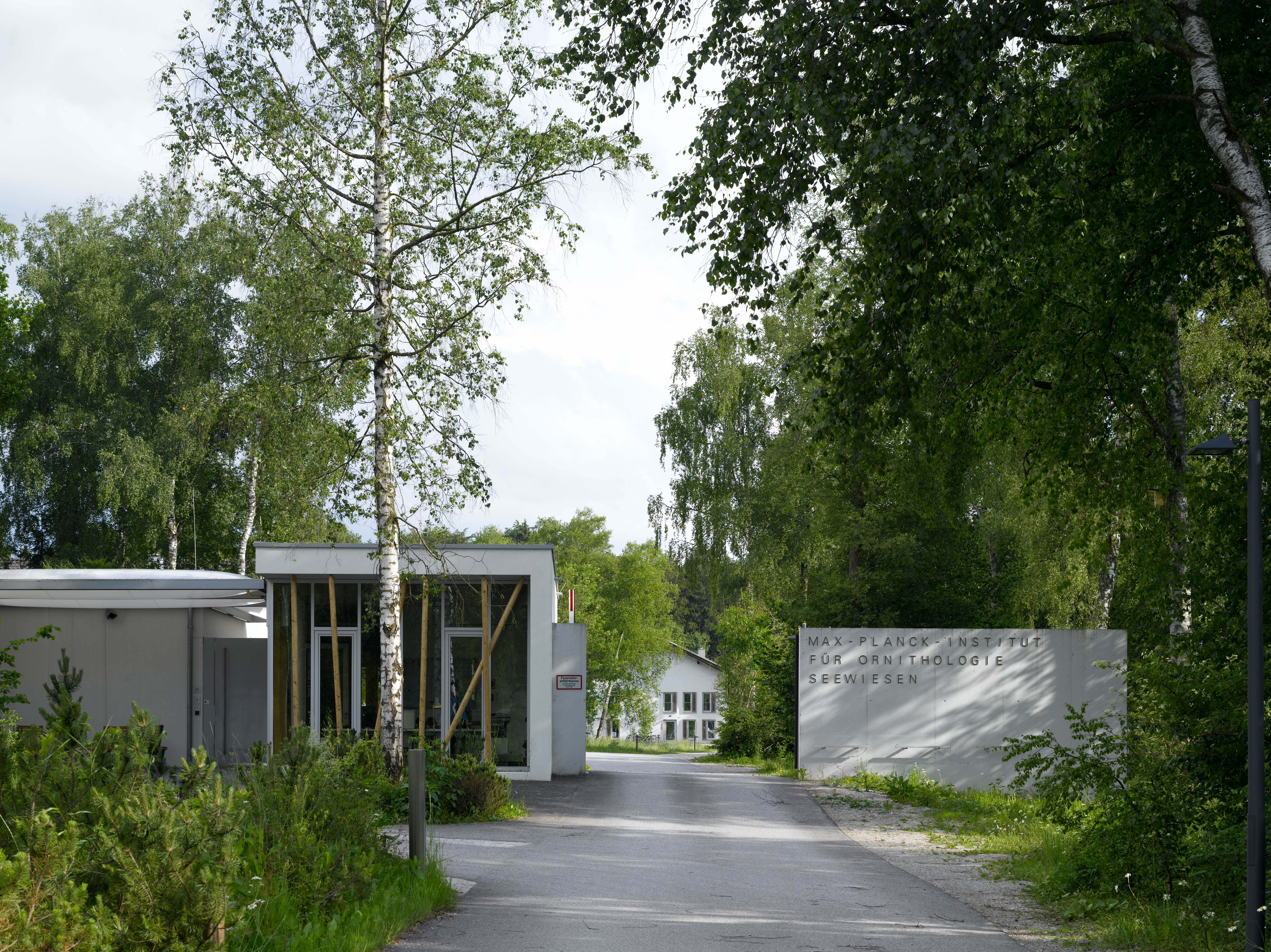 Seewiesen Eingang Mueller Naumann